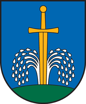 Kavarsko miesto herbas